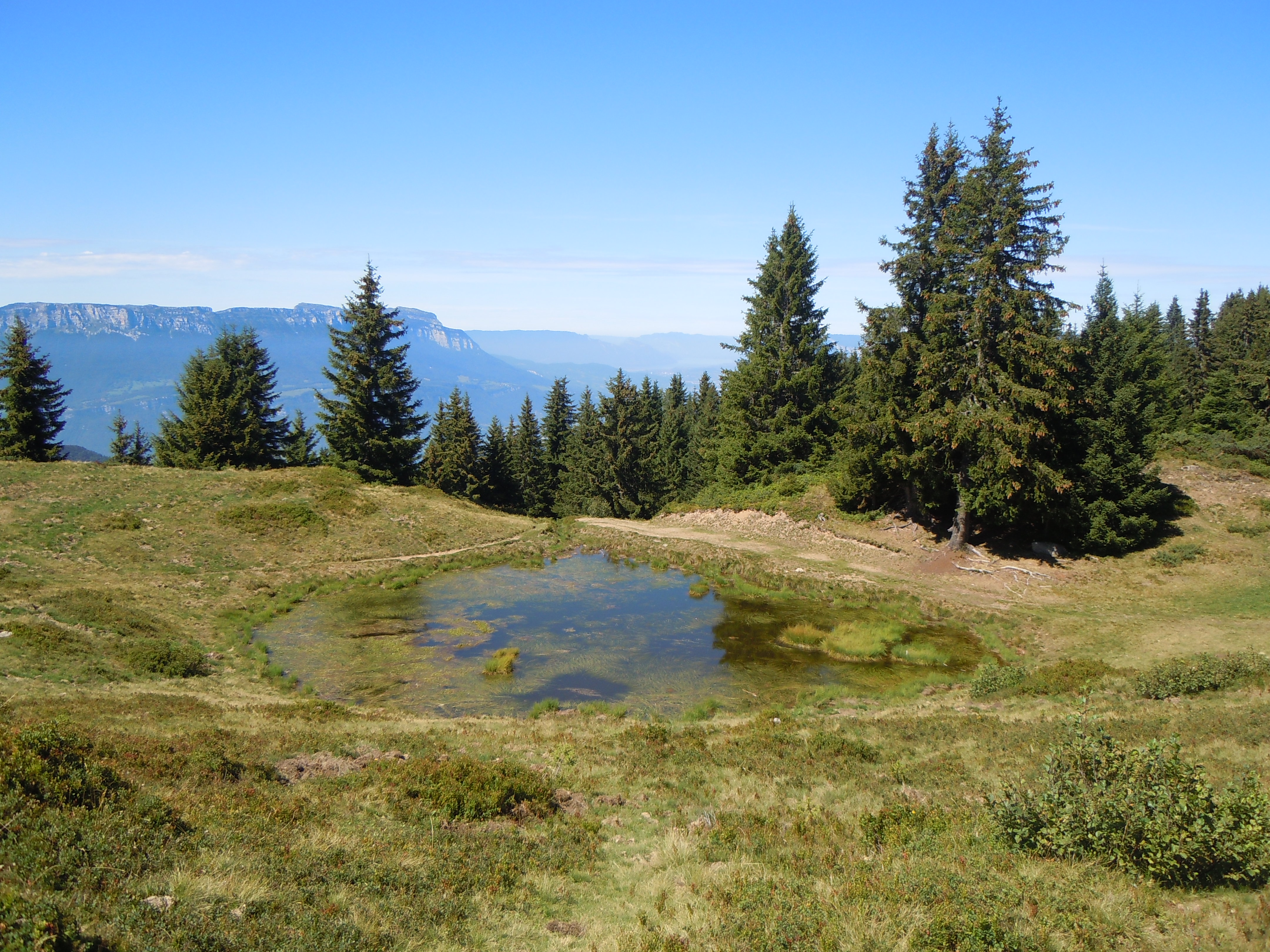 Tourbière au Prayet - Saint Pierre d'Allevard - Isère - France